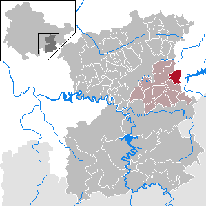 Tegau in Thuringia - Saale-Orla-Kreis